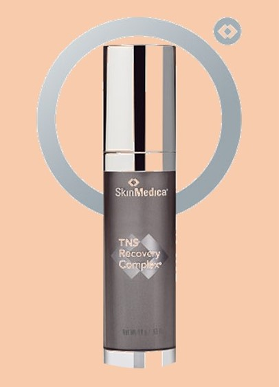 TNS recovery complex, es uno de los productos con componentes a base de prepucios. Promovido por Oprah Winfrey. Montaje gráfico hecho a partir de File:TNS recovery complex.jpg en File:Cosmetics.JPG